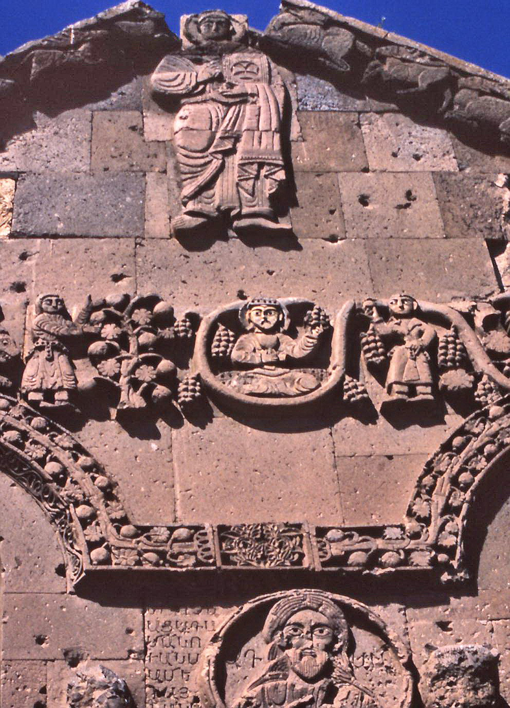 Akdamar